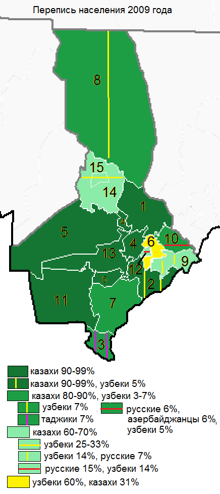 Этнический состав населения Южно-Казахстанской области